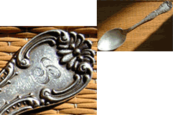 Используемый в монограмме инициал "S" выгравирован на ложке